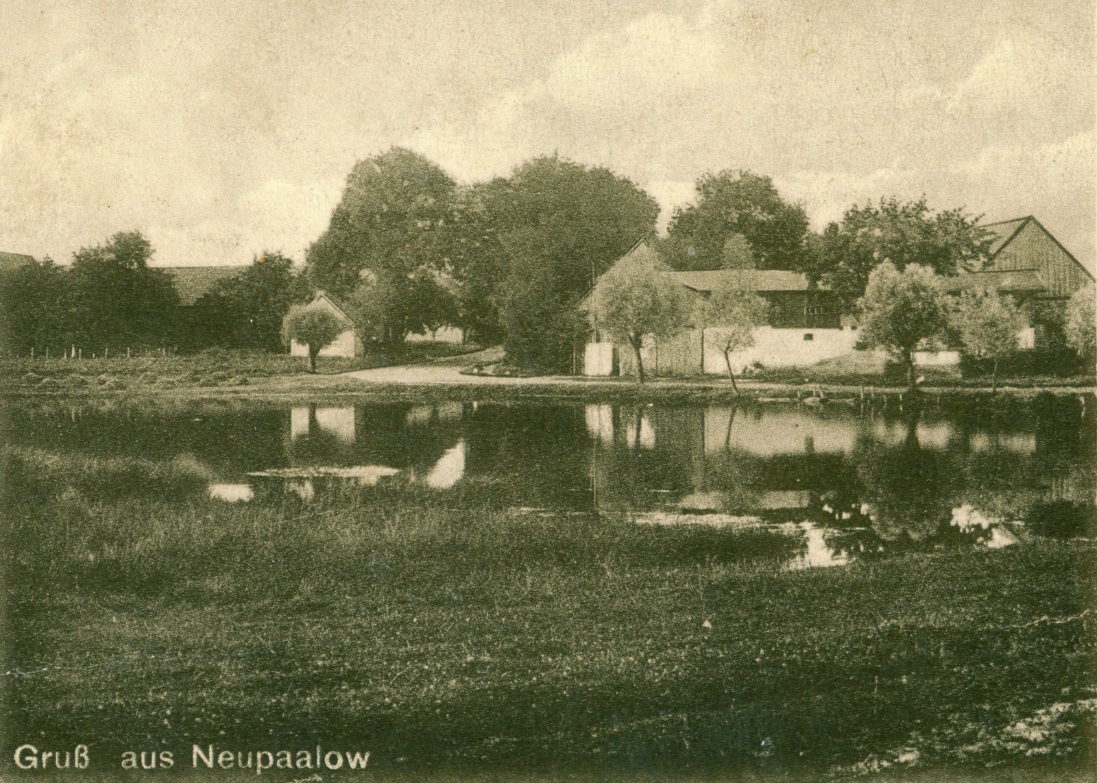 Widok na stawek w Pałówku. Jest to kartka z pozdrawieniami